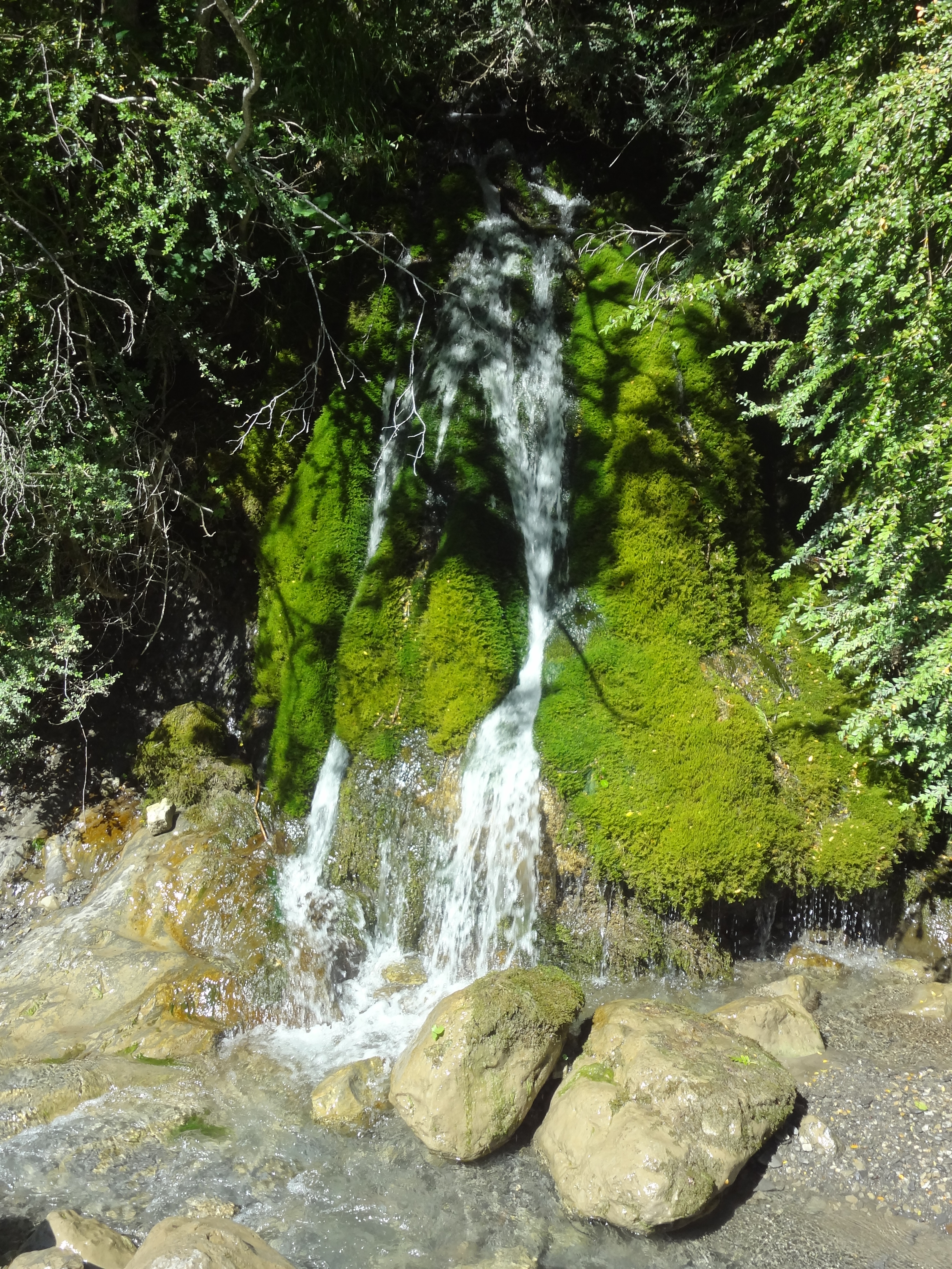 Téléchargée avec Commonist 0.9.1 Cascade moussue de La Melle